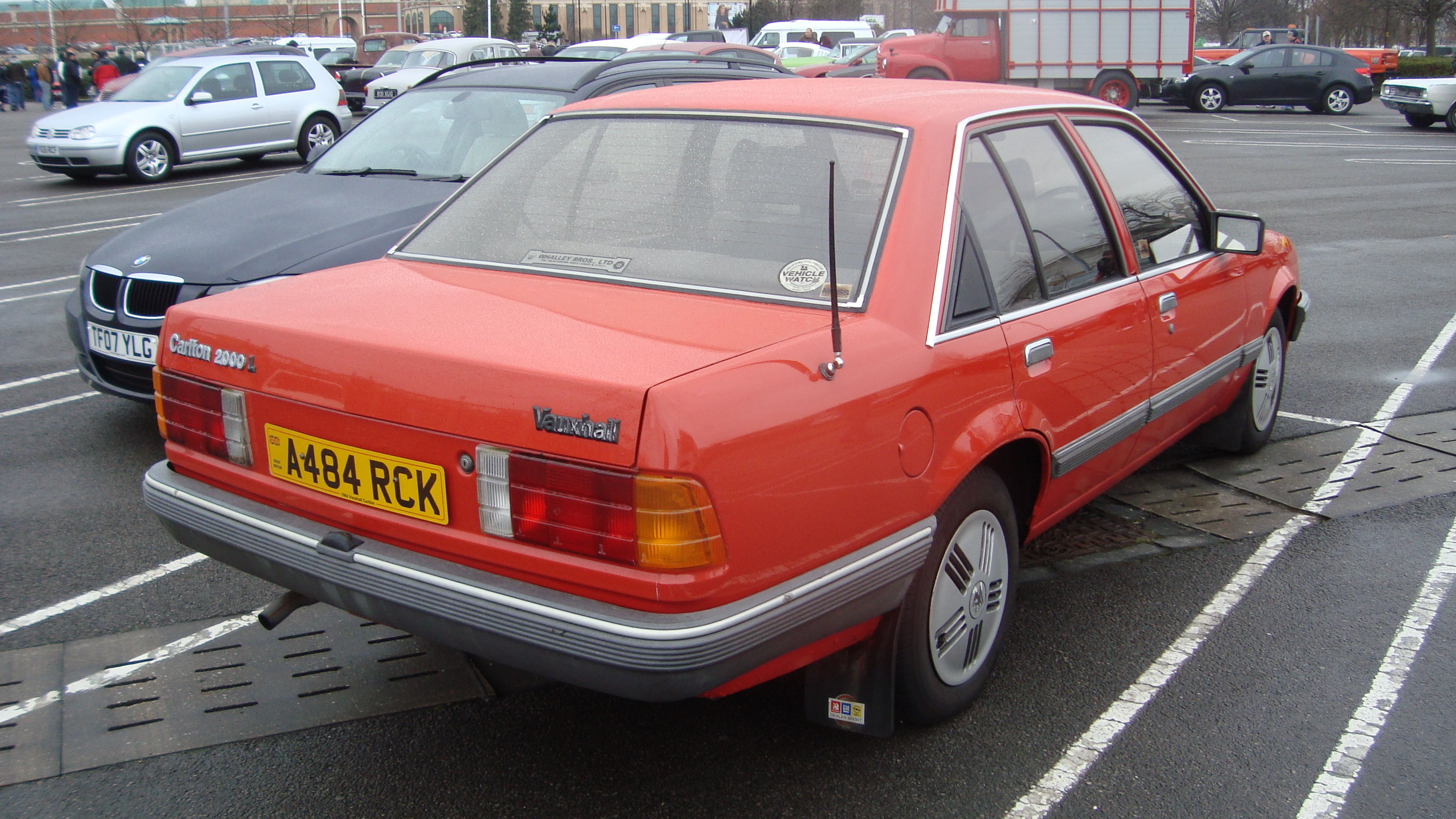 1984 Vauxhall Carlton 2000 L